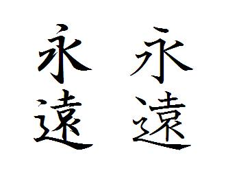 Japanese kanji